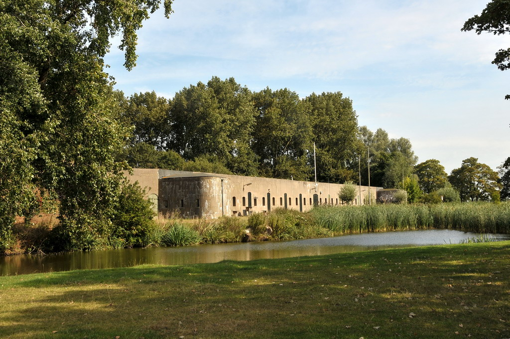 Stelling van Amsterdam: Fort aan Den Ham